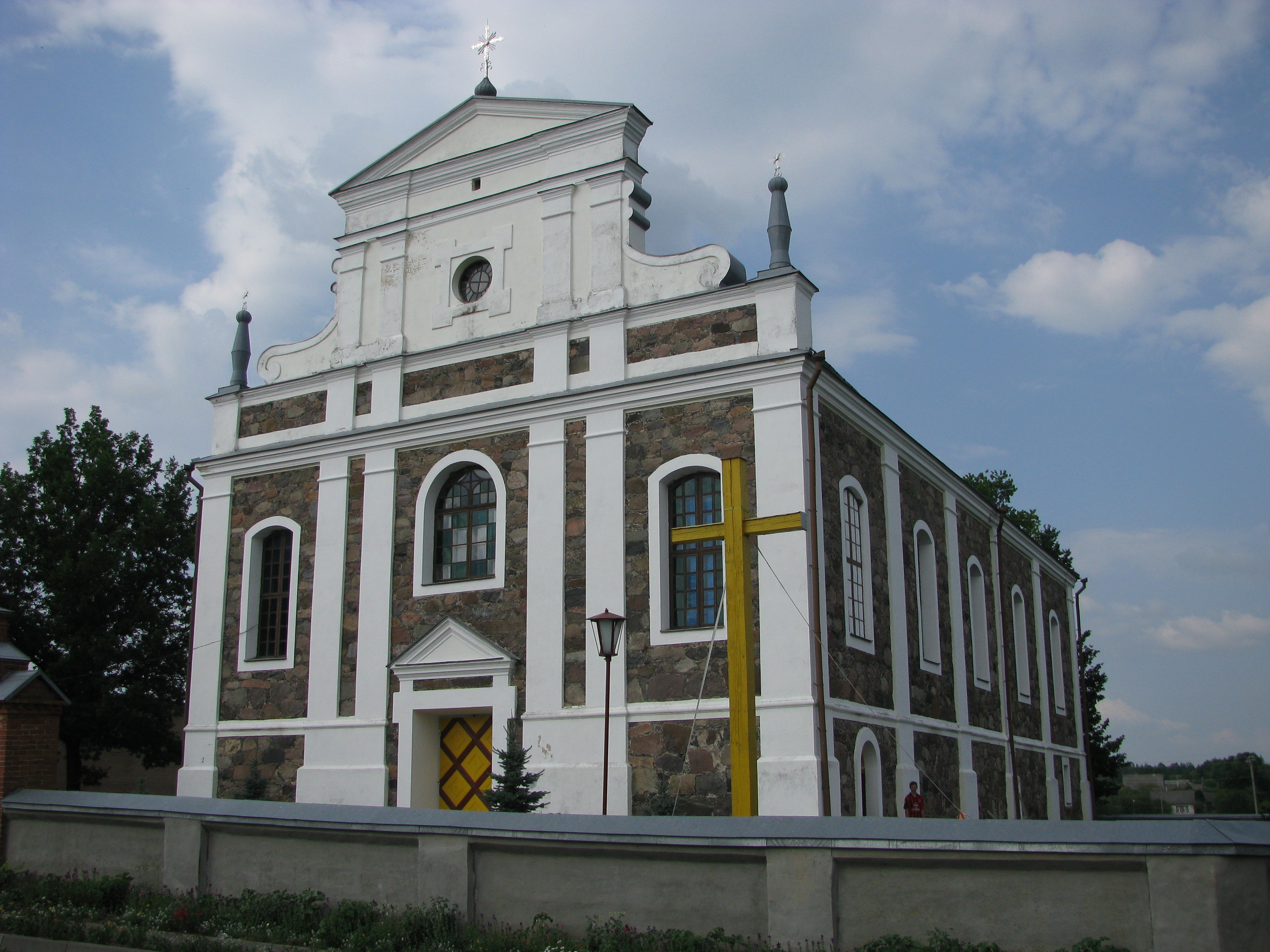 Беларуская (тарашкевіца): Касьцёл Яна Хрысьціцелябакавыя алтары. в. Ваўкалата This is a photo of Belarusian heritage monument. Reference number: 212Г000432 ( WLM)